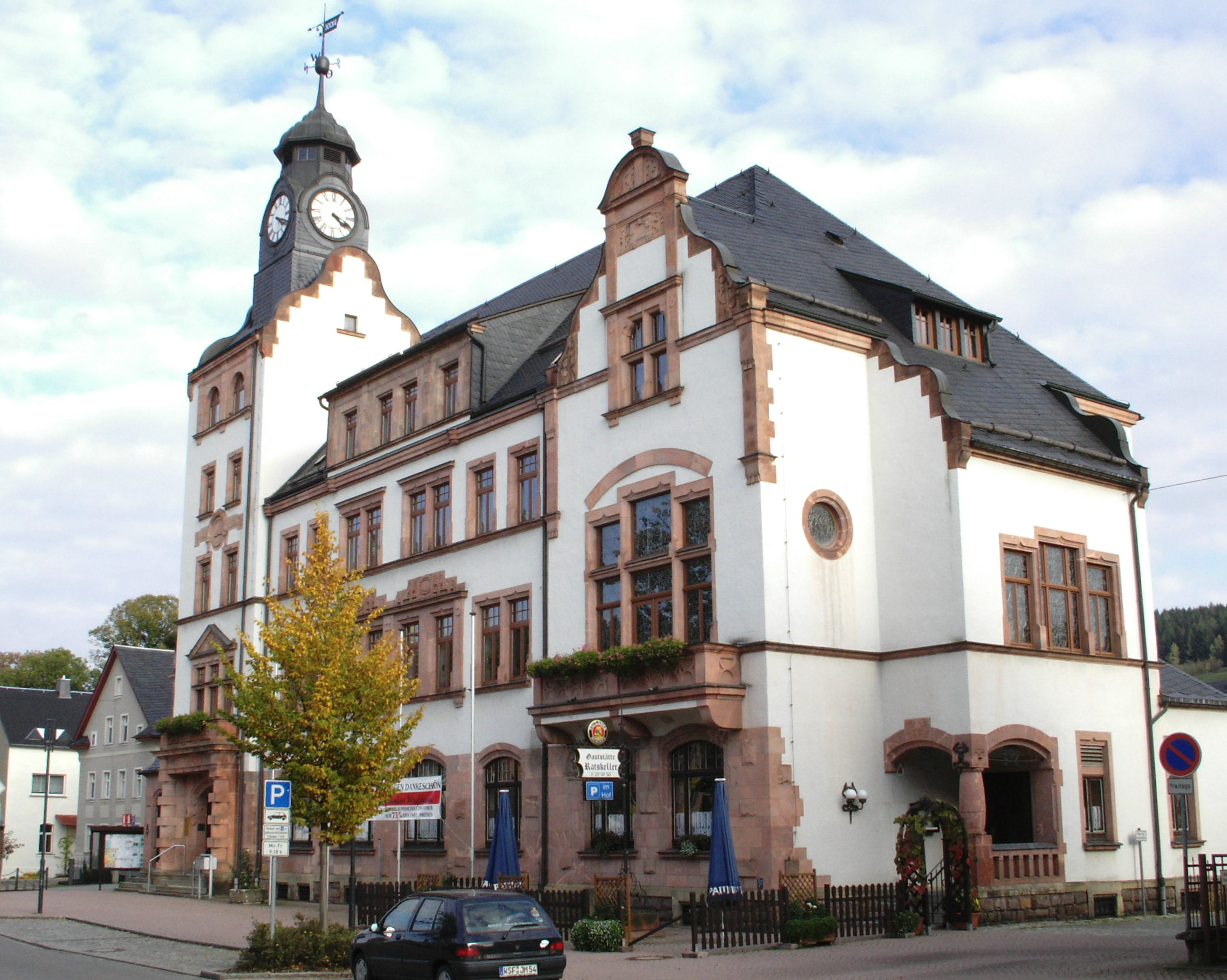 Thalheim/Erzgeb., Rathaus